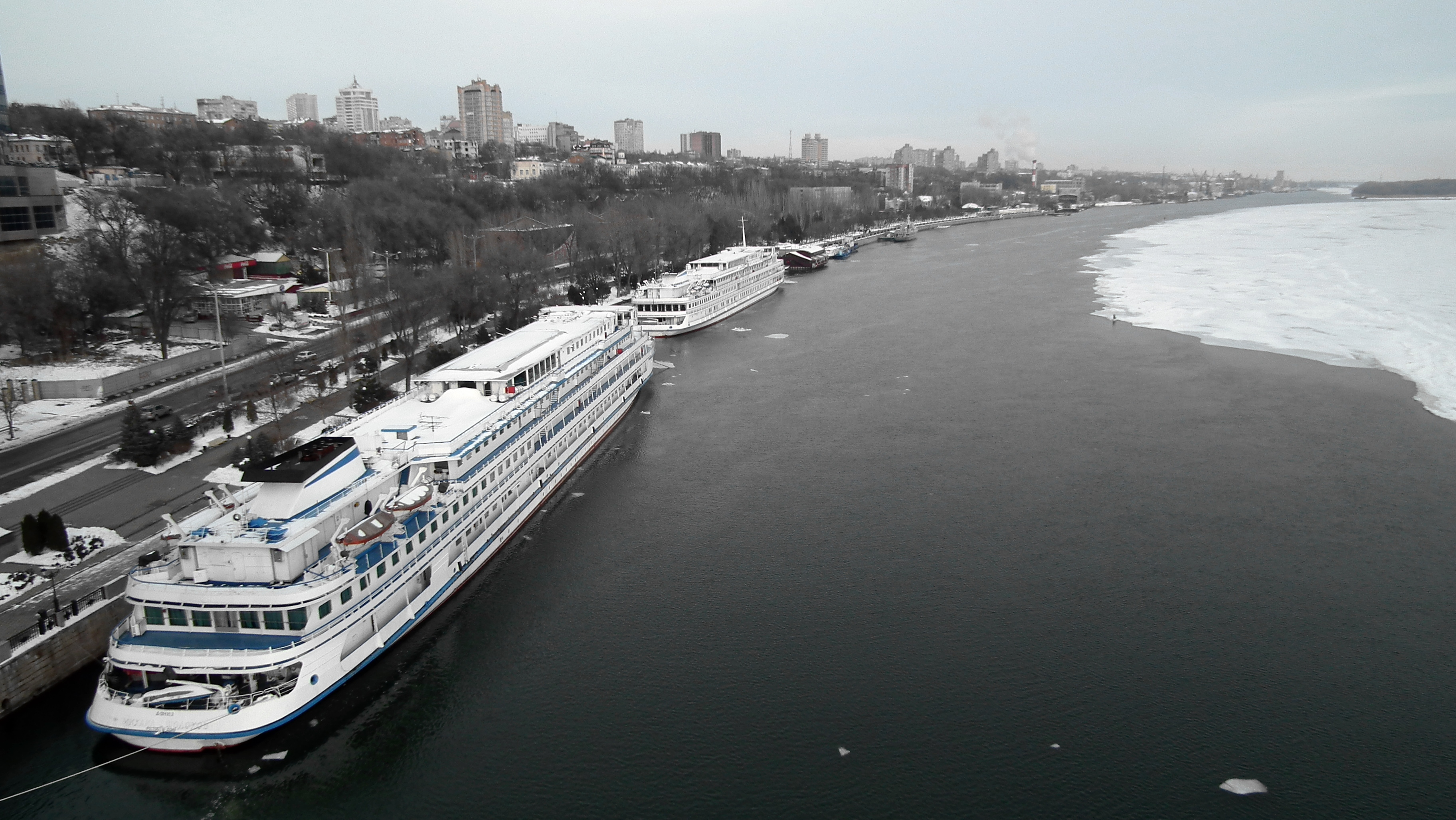 Набережная с Ворошиловского моста